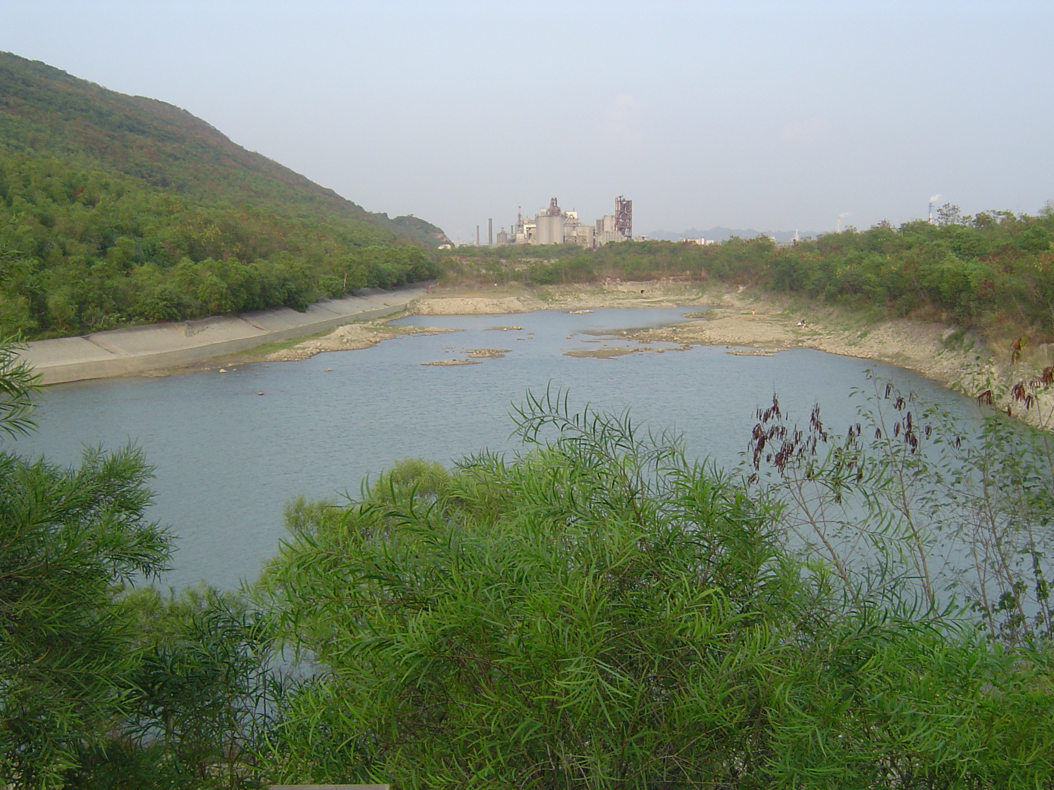 高雄市半屏湖溼地近照。